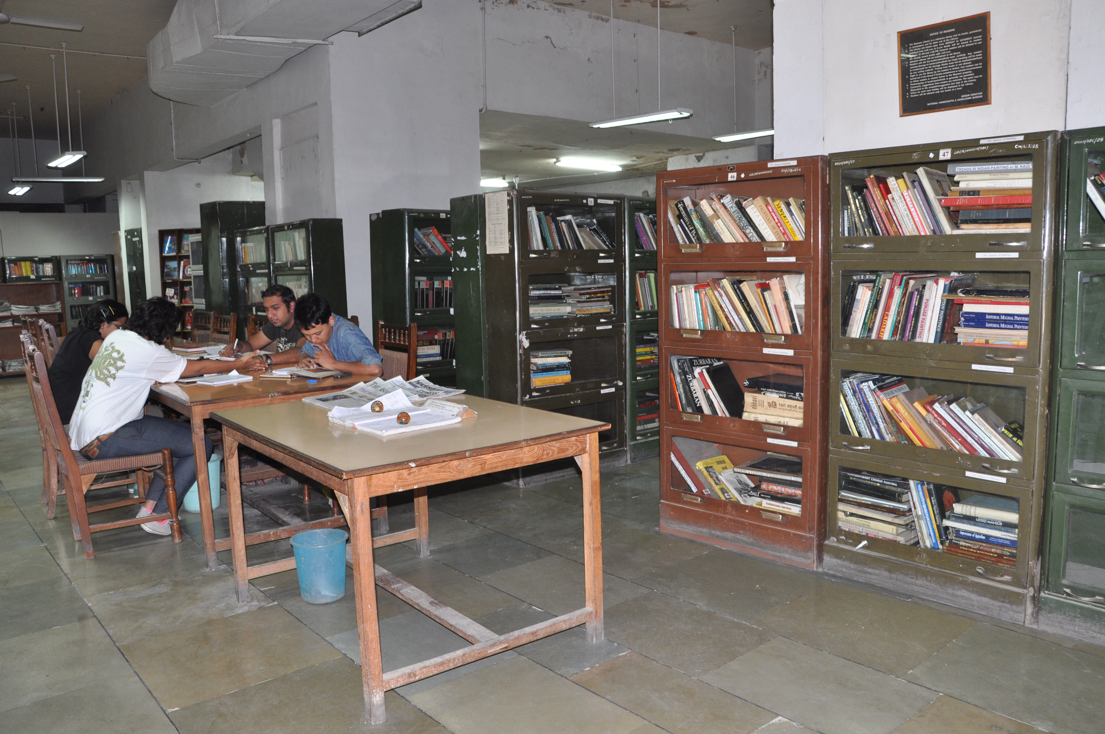 Crafts Museum, New Delhi